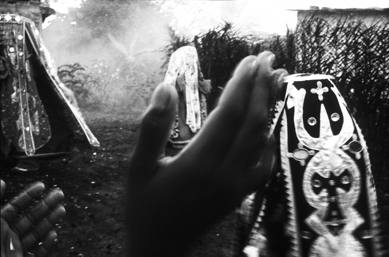 Ritual de dança dos Egunguns. Itaparica-Bahia. Foto Guy Veloso